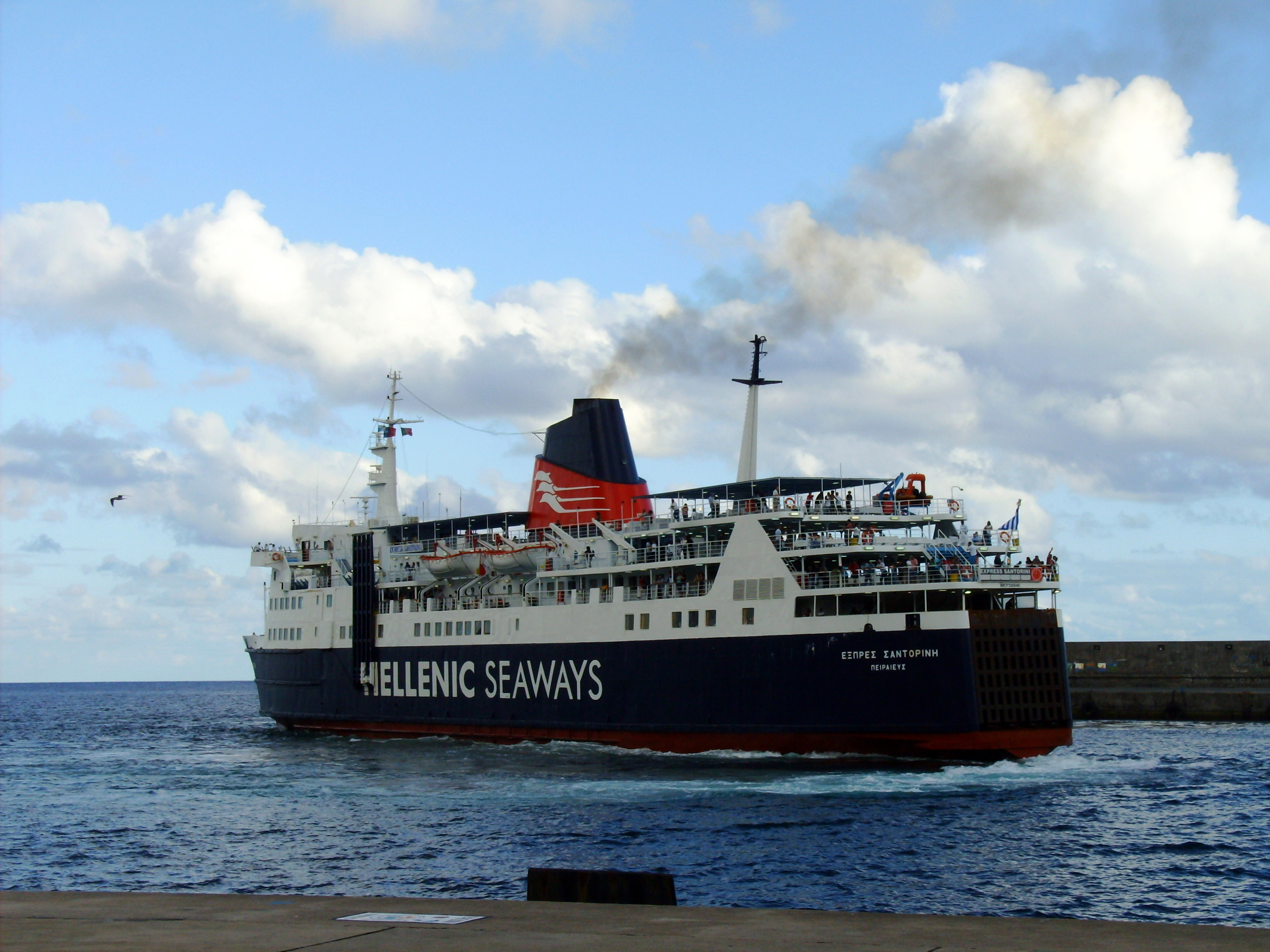 M/F Express Santorini no porto de Vila do Porto, ilha de Santa Maria, Açores. IMO Number: 7330040 MMSI Number: 240636000 Callsign: SXQR Length: 115,4 m Beam: 19,2 m